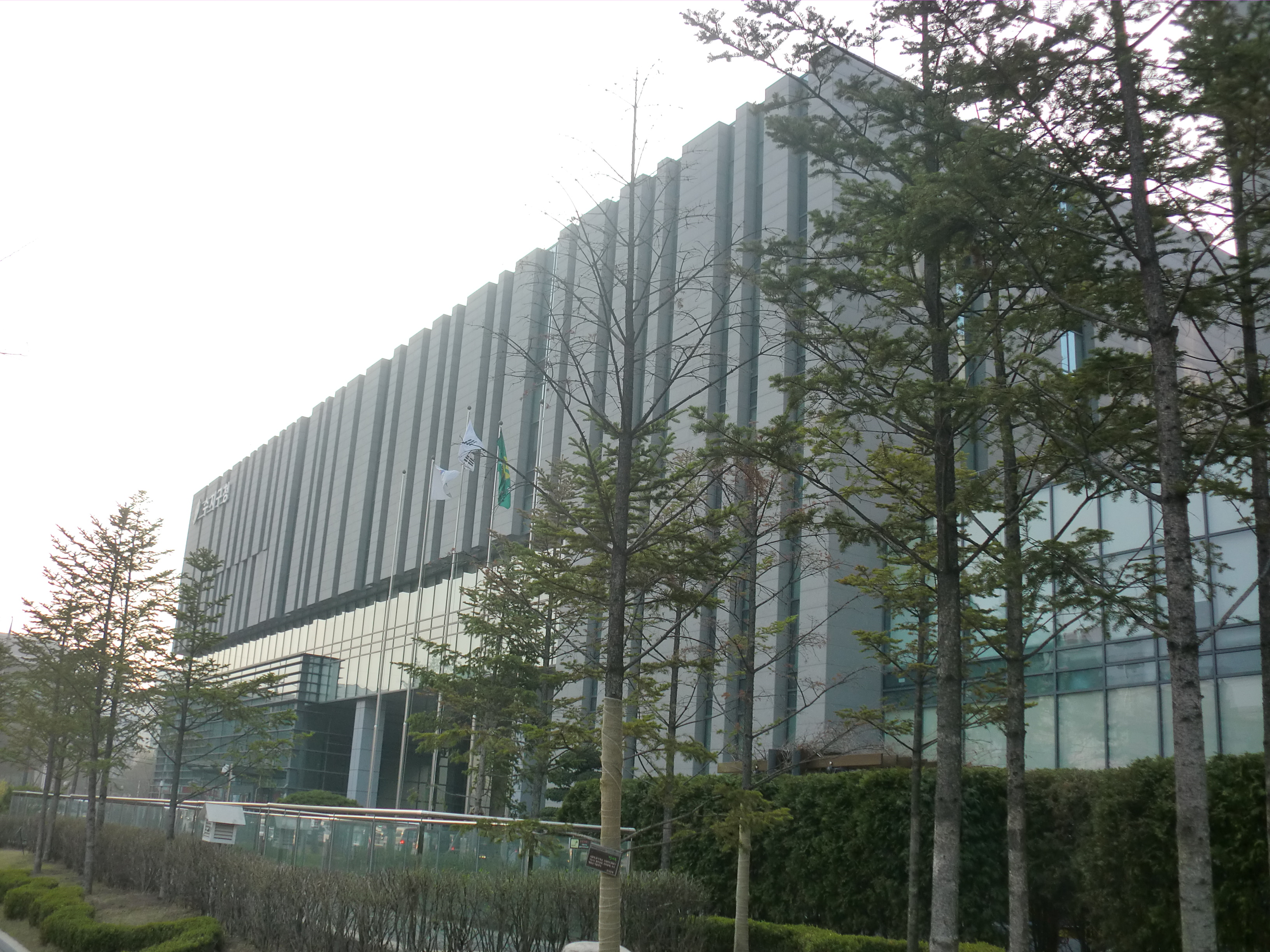 경기도 용인시에 있는 수지구청